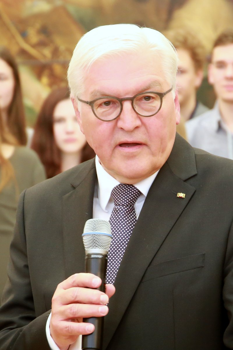 Frank-Walter Steinmeier, Bundespräsident der Bundesrepublik Deutschland, hier während seines Antrittsbesuchs in Bayern am 26. April 2017 im Bayerichen Landtag) Titel des Werks: 'Frank-Walter Steinmeier, Bundespräsident (DE), am 26. April 2017 im Bayerichen Landtag'